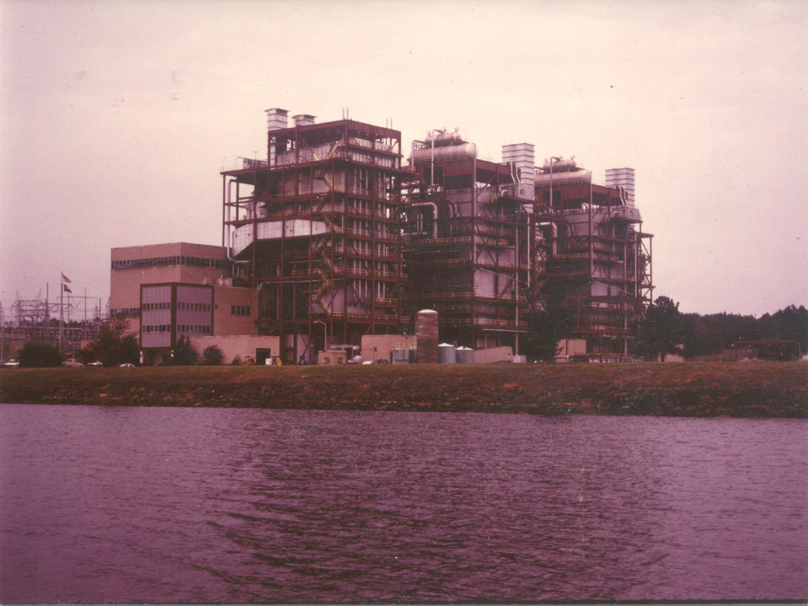 Wilkes power plant